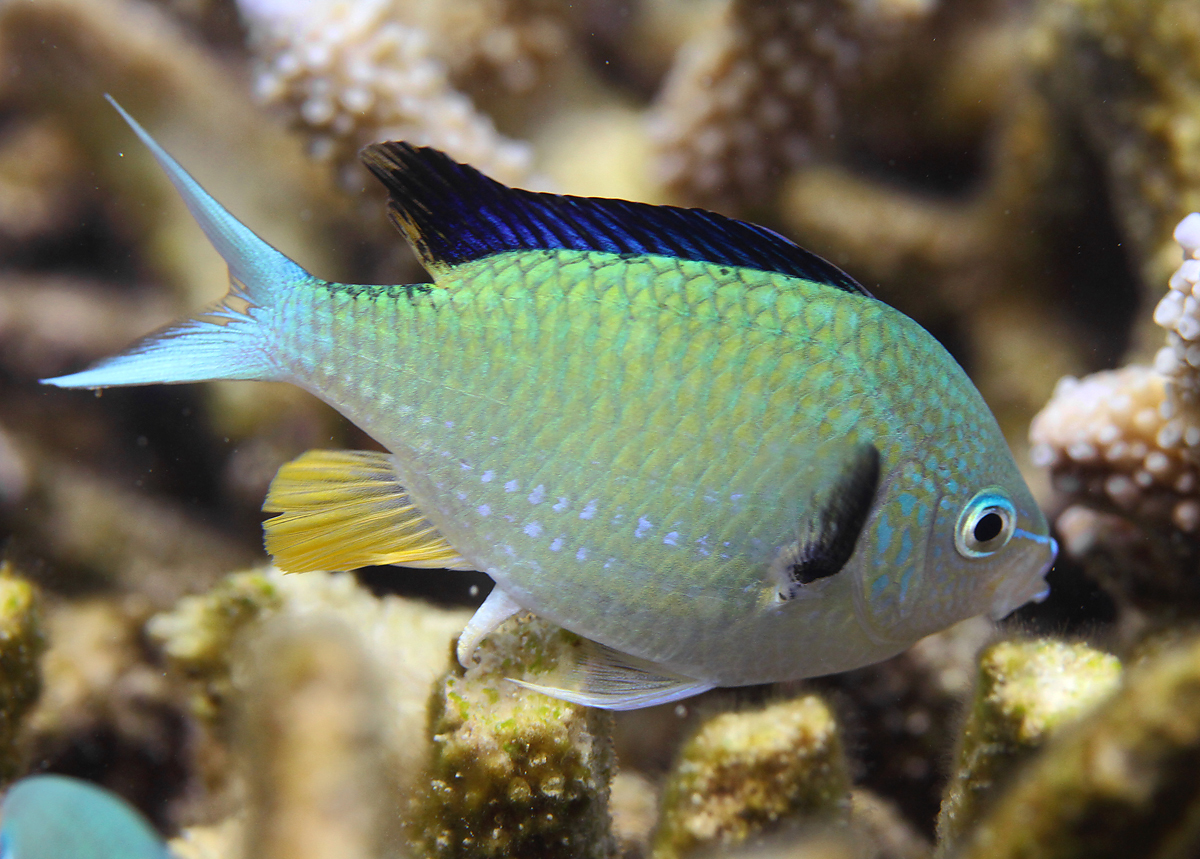 Un poisson-demoiselle bleu-vert (Chromis viridis) mâle, papille génitale déployée, en train de féconder les œufs qu'une femelle vient de déposer sur une branche de corail mort, à la Réunion.